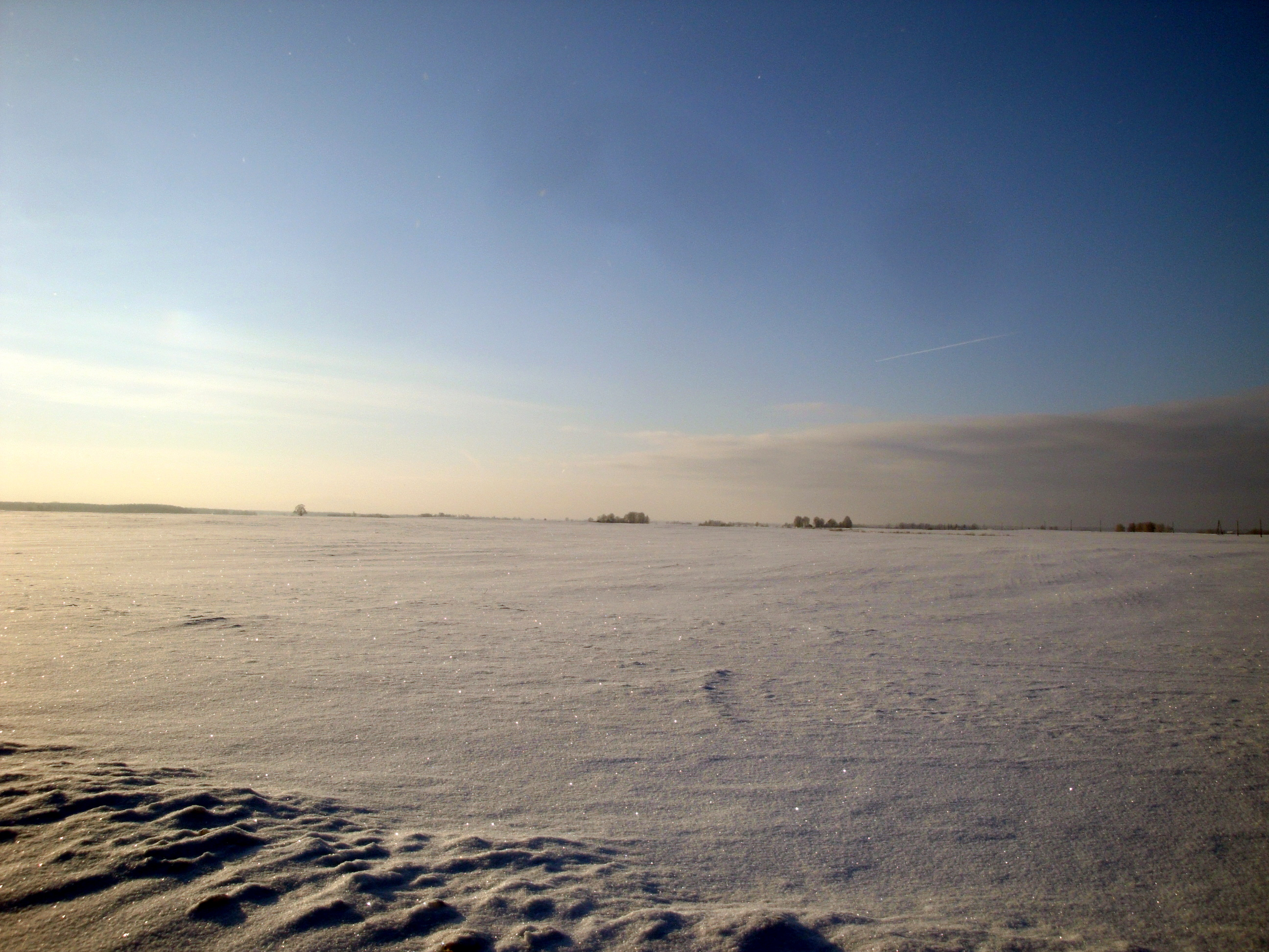 Bukaiši parish, LV-3714, Latvia